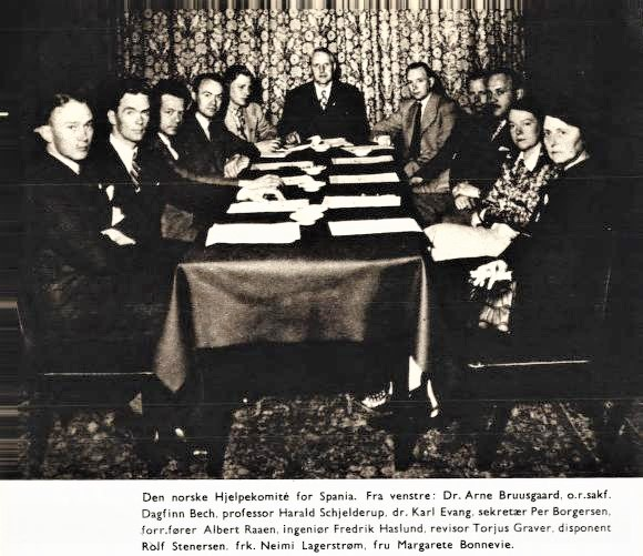 Neimi Lagerström med Den Norske Hjelpekomité for Spania, 1930-tallet